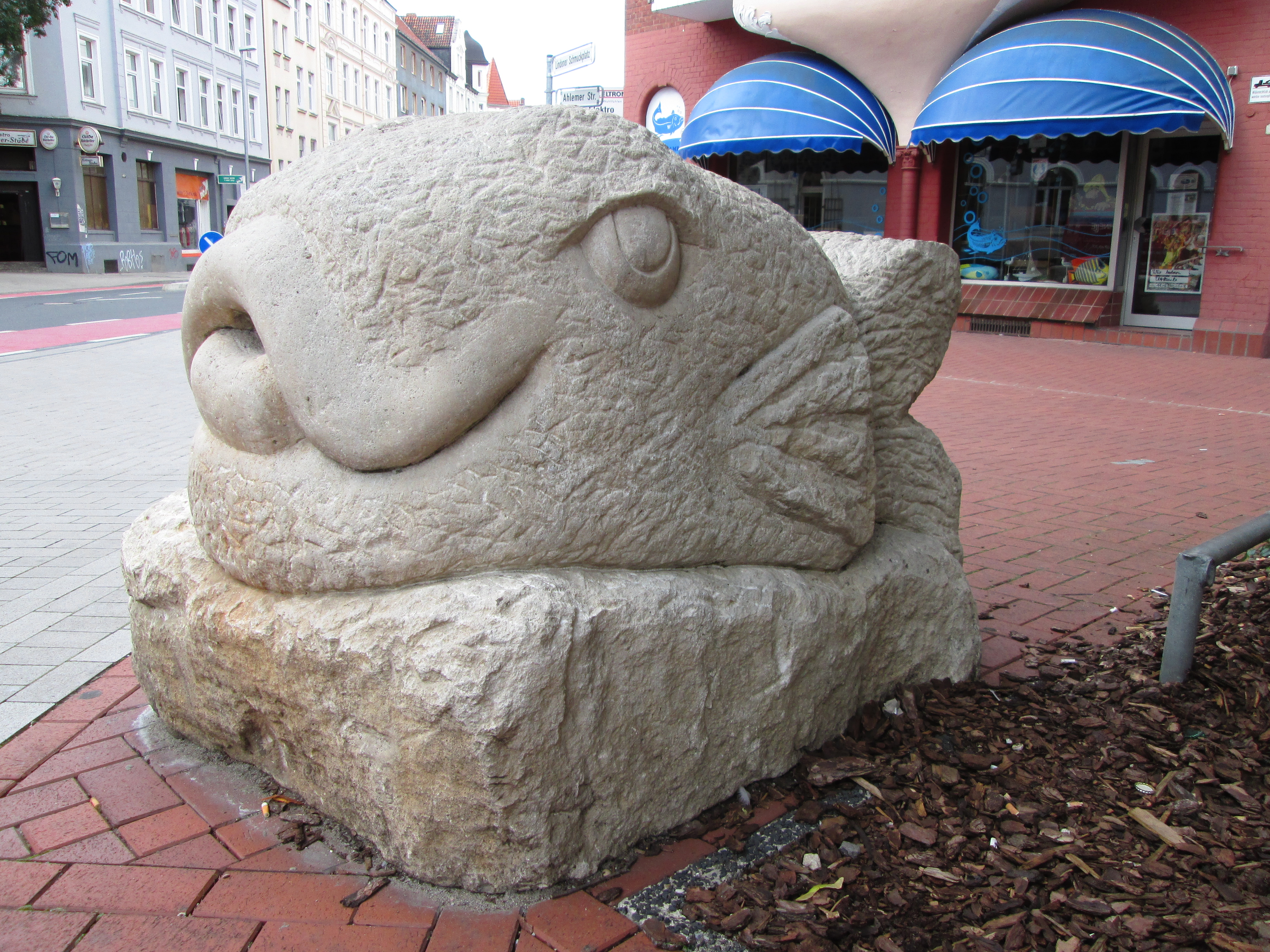 1. Fischskulptur am Lindener Schmuckplatz - Hannover-Linden Ahlemer Straße